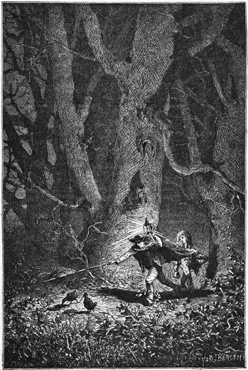 Légende d'époque : Ces oiseaux de passage, dont les chasseurs font le plus grand cas, nous arrivent par un temps sombre, le plus souvent la nuit; ils s'abattent dans les taillis ou les futaies, et préfèrent les bois où il y a beaucoup de terreau humide et de feuilles mortes; ils s'y trouvent si bien cachés qu'il faut des chiens pour les l'aire lever. Ils quittent ces fourrés à rentrée de la nuit pour se répandre dans les clairières en suivant les sentiers, C’est là qu'on les prend facilement au lacet. En Bretagne, on leur fait la chasse d'une singulière façon. Deux hommes se réunissent pour s'embusquer dans les pâturages de la forêt, où, sous les bousards (bouses) de vache, les bécasses trouvent une ample moisson de vers. L'un porte une lanterne et une sorte d'épinette fixée à l’extrêmité d'un long manche; l'autre une de ces sonnettes qu'on attache au cou des vaches. Les oiseaux se laissent ainsi approcher d'assez près pour les enserrer dans les mailles d'un filet (Voir fig. 3). (...)La bécasse est, Comme dit Belon, « une moult grosse bête (1), » si elle se laisse prendre de la manière qu'il raconte et qu'il nomme folâtrerie. « Un homme couvert d'une cape couleur de feuilles sèches, marchant courbé sur deux courtes béquilles, s'approche doucement, s'arrêtant lorsque la bécasse le fixe, continuant d'aller lorsqu'elle recommence à errer jusqu'à ce qu'il la voie s'arrêter la tête basse ; alors frappant doucement de ses deux bâtons l'un contre l'autre, la bécasse s'y amusera et affolera tellement, que le chasseur l'approchera d'assez près pour lui passer un lacet au cou. » La chair de la bécasse, y compris les excréments, est une friandise pour ceux qui l'aiment. C'est le cas de rappeler le proverbe latin : Degustibus... non est disputandum. 1: Belon, Histoire de la nature des oiseaux, p. S7S /Paris, 1355, in-fol.)